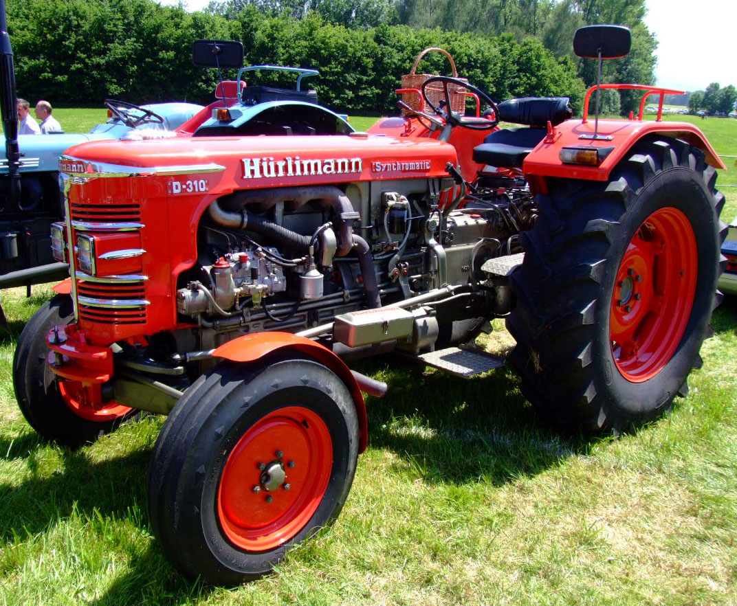 En Hürlimann D-310 Trakter